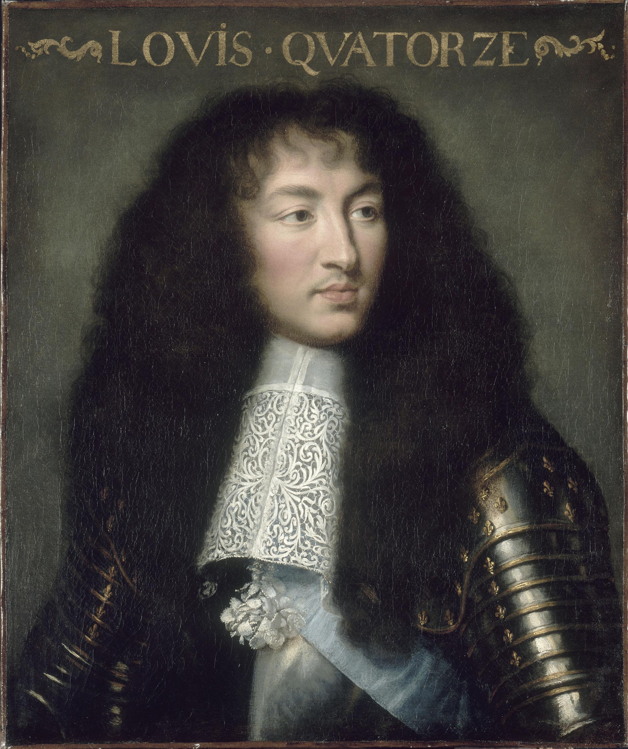 Louis XIV, roi de France et de Navarre